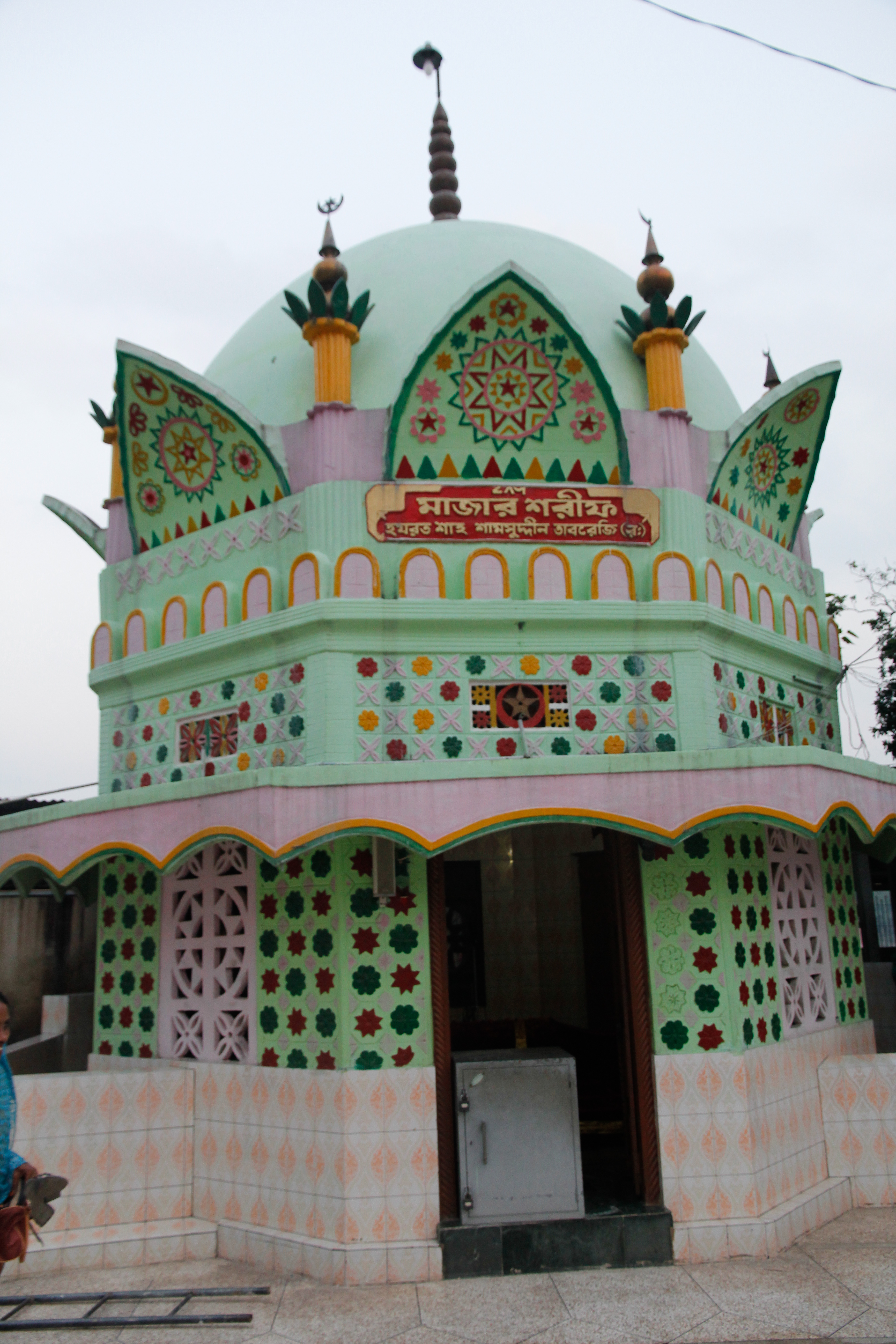 শামসুদ্দিন তাবরিজির মাজার